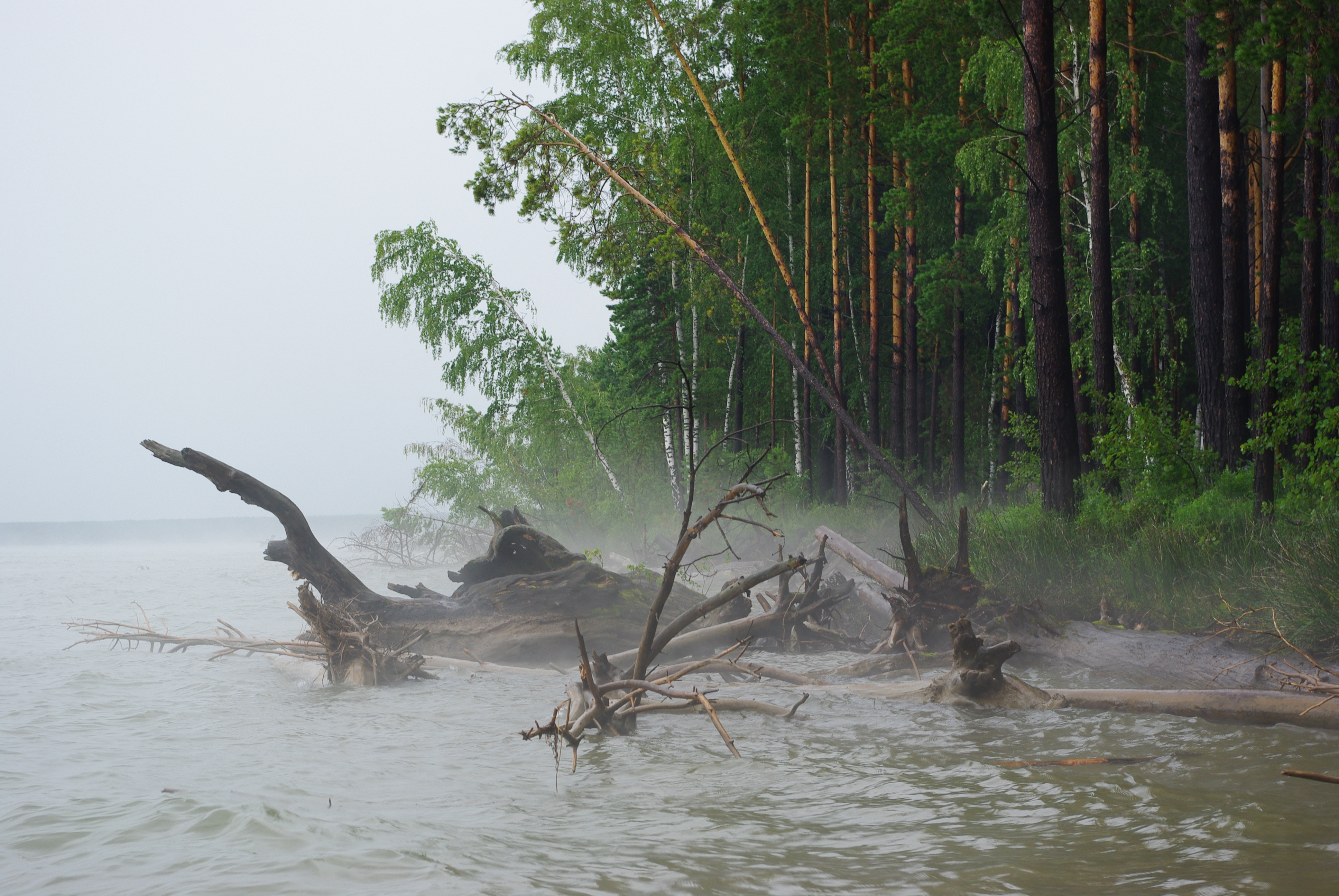 Караканский бор: Новосибирская область This image is related to the protected area of Russia number 5400003